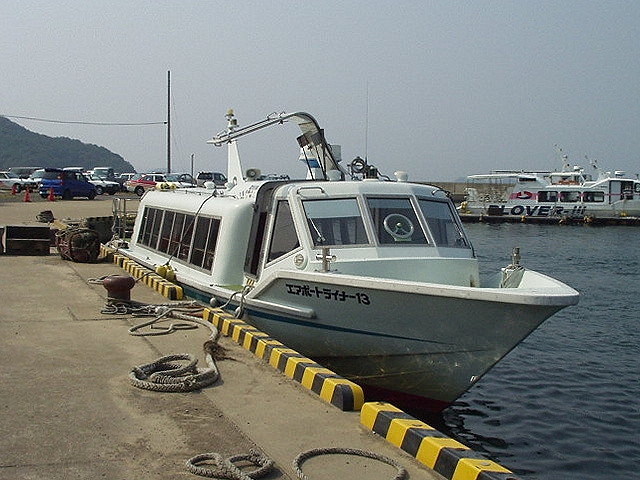 安田産業汽船の｢エアポートライナー13｣ 2006年6月、長与港